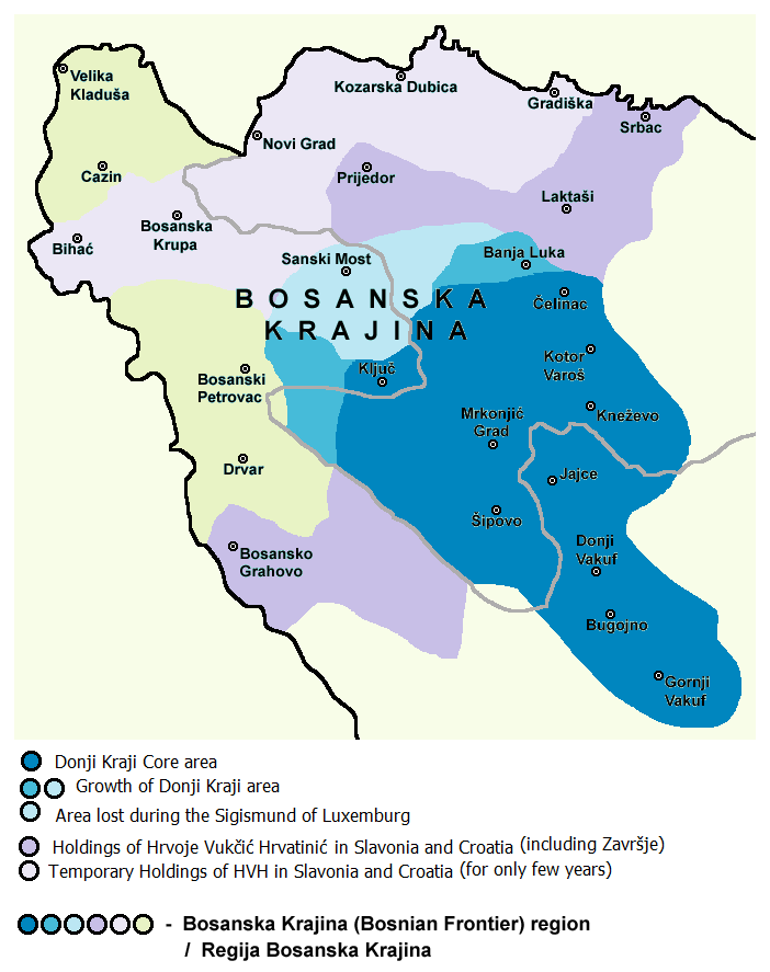 Rast područja Donjih kraja i posjeda Hrvatinića na području Bosanske krajine, originalna karta